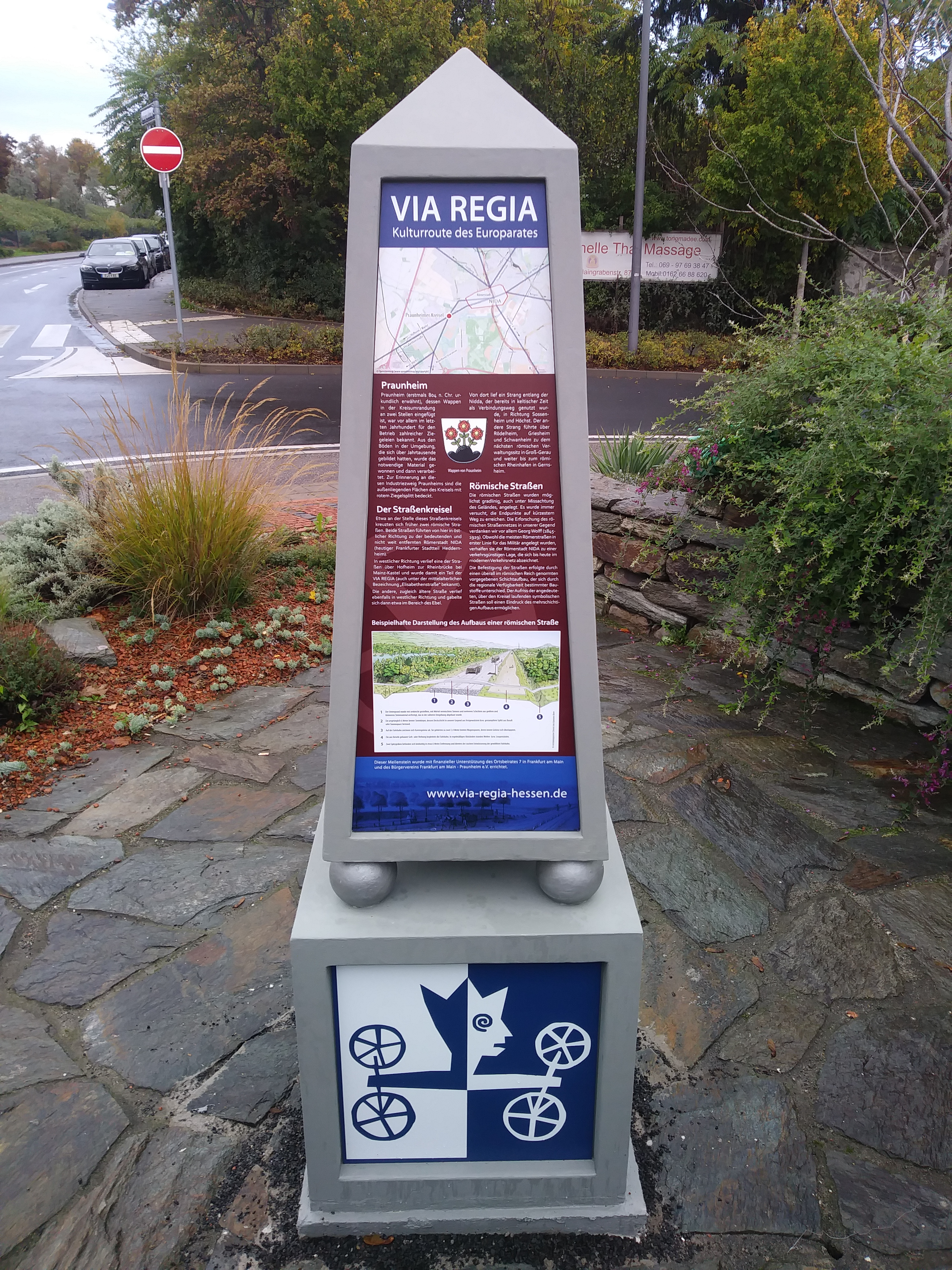 Meilenstein in Frankfurt-Praunheim